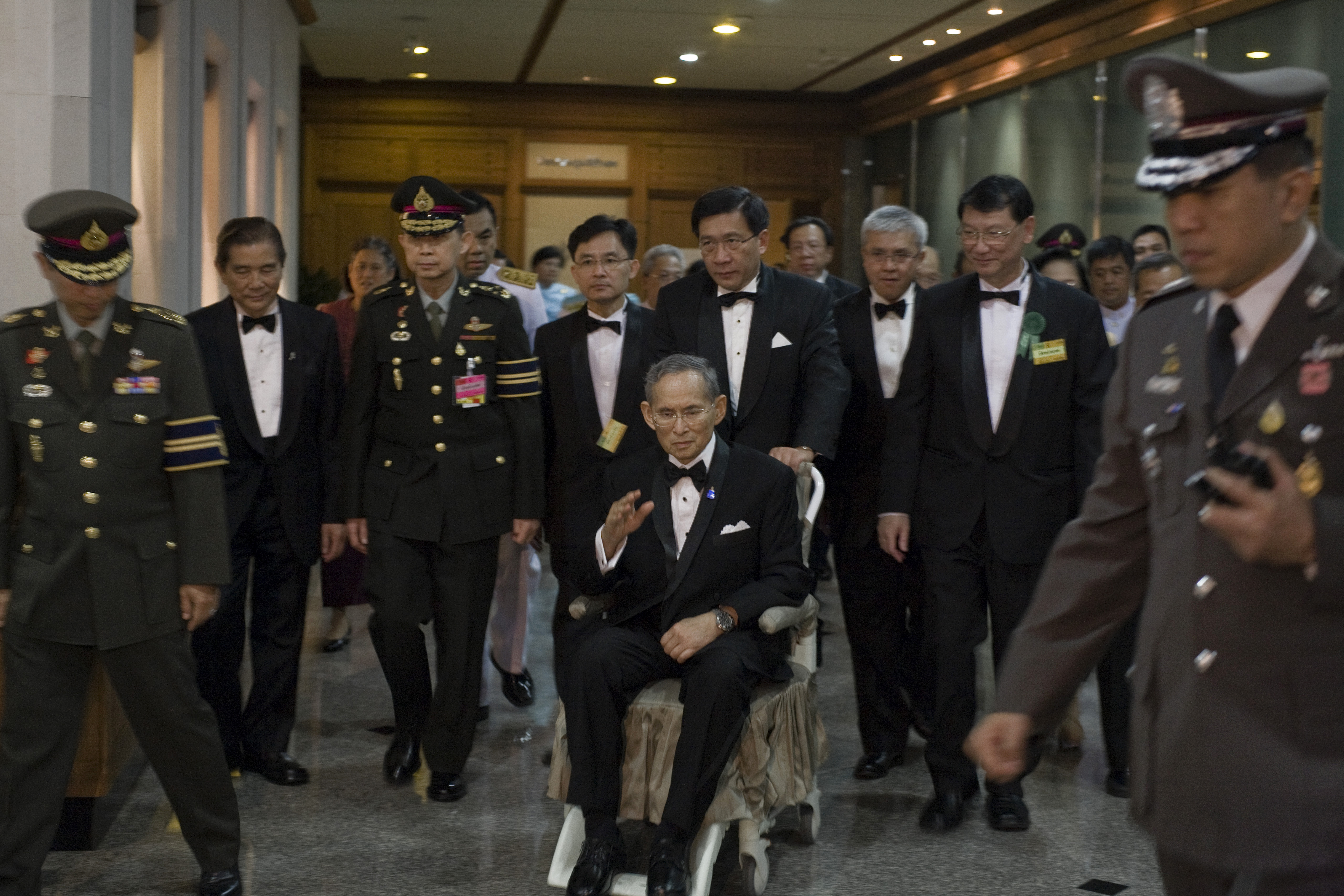 ทรงพระเจริญยิ่งยืนนาน พระบาทสมเด็จพระเจ้าอยู่หัวเสด็จฯ ทอดพระเนตรการแสดง "ศิริราชคอนเสิร์ต เทิดไท้องค์อัครศิลปิน" ณ หอประชุมราชแพทยาลัย โรงพยาบาลศิริราช วันพุธ ที่ 29 กันยายน พ.ศ.2553 (Photographer attached to the Prime Minister of the Kingdom of Thailand : Peerapat Wimolrungkarat / พีรพัฒน์ วิมลรังครัตน์)